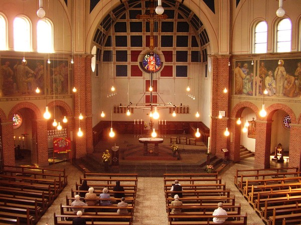 St. Augustinus in Nordhorn